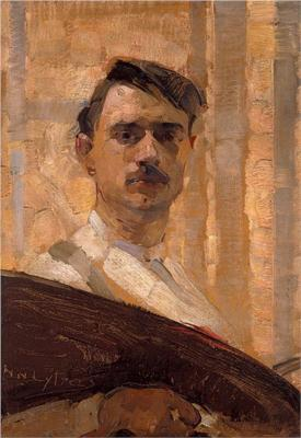 Self-portrait, alternate coloring